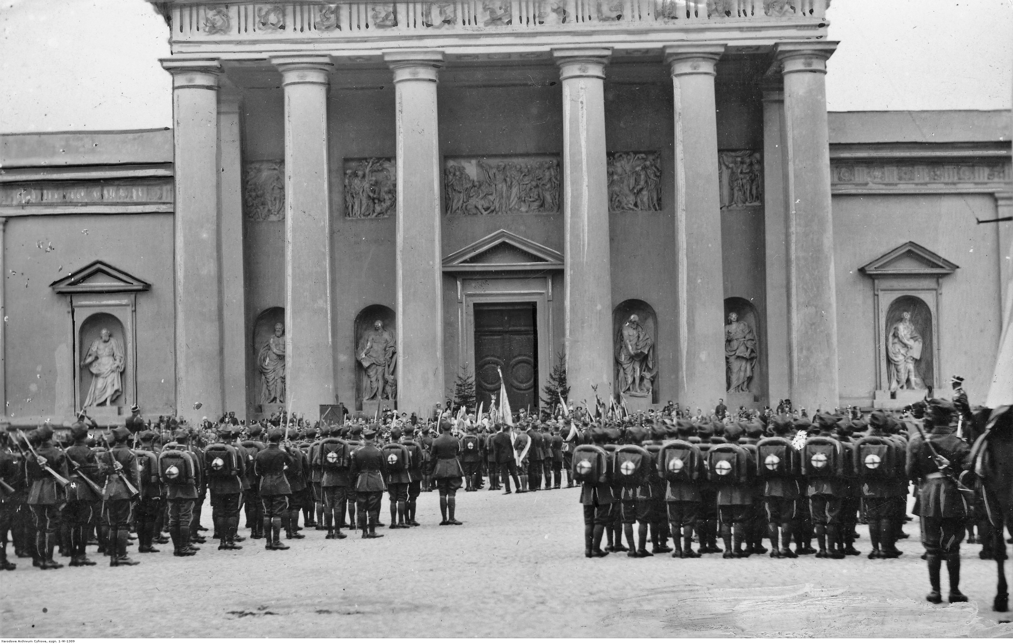 Święto 85 Pułku Strzelców Wileńskich w Wilnie - oddziały w pełnym rynsztunku przed katedrą wileńską; 25 września 1928. Koncern Ilustrowany Kurier Codzienny - Archiwum Ilustracji. Sygnatura: 1-W-1309